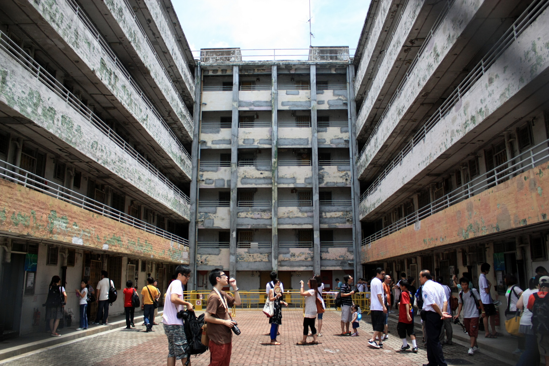 Mei Ho House 美荷樓